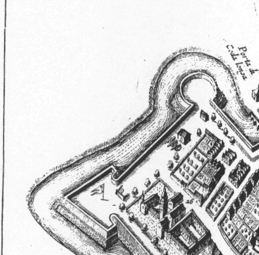 San Giovanni di Verdara e le mura a Padova mappa 1640